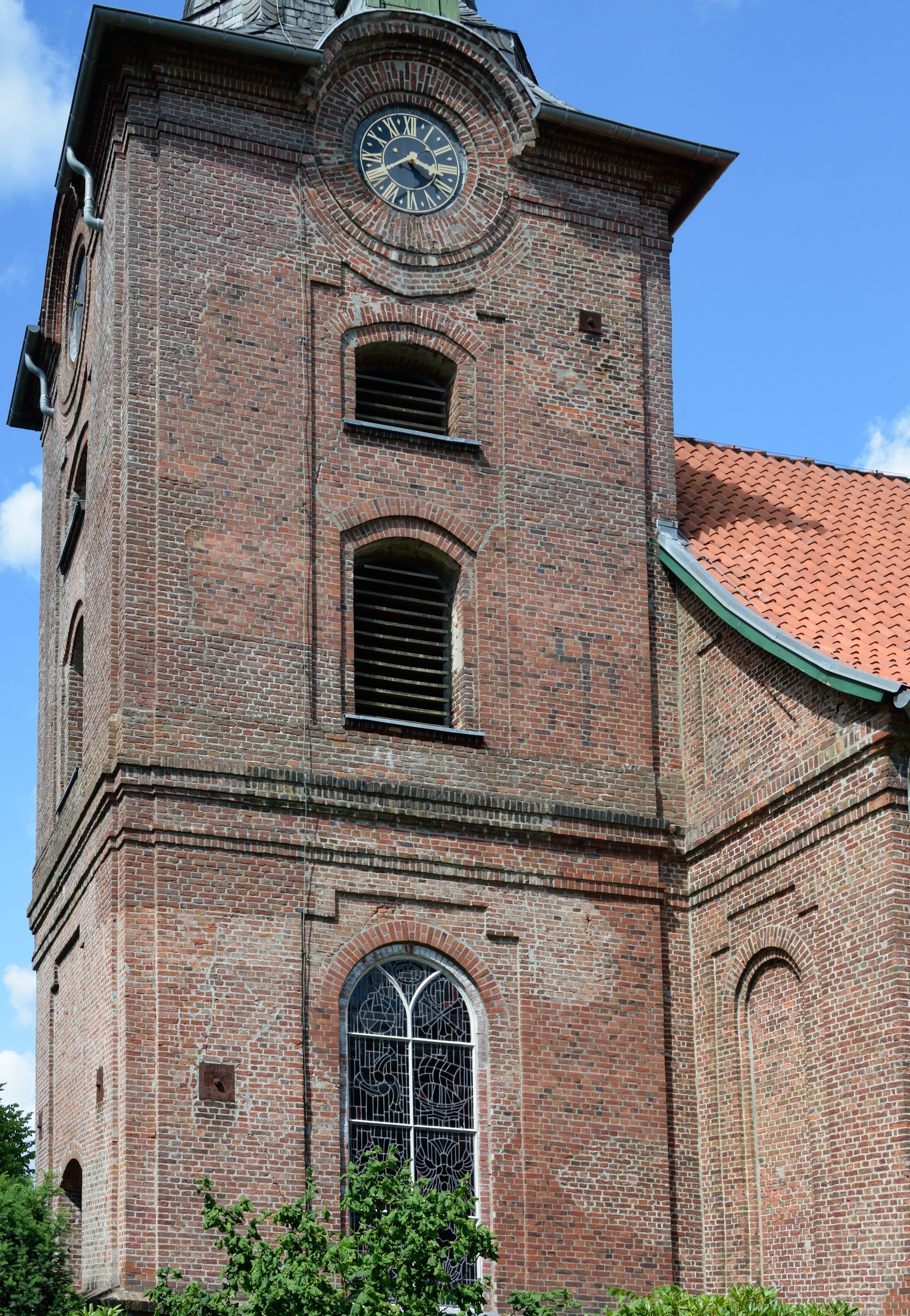 Kirche in Hohenfelde, Kreis Steinburg. In einer ausgebesserten Mauerstelle ist ein Hakenkreuz erkennbar.